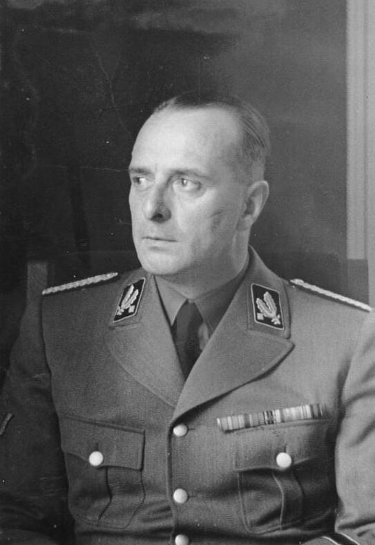 Hanns Rauter SS-Brigadeführer Rauter, Generalkommissar f.d. Sicherheitswesen. 9246-40 [Hanns Albin Rauter eigentlich Johann Baptist Albin in der Uniform eines SS-Brigadeführers (seit 1939, April 1941 Ernennung zum SS-Gruppenführer)] Abgebildete Personen: Rauter, Hanns: SS-Obergruppenführer, Polizeigeneral, 1948 Prozeß Den Haag, Deutschland